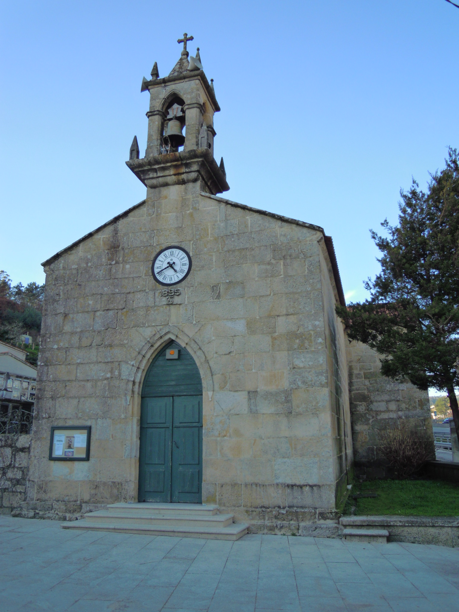 Igrexa parroquial de Petelos (Mos)